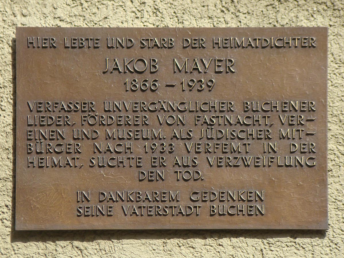 Buchen (Odenwald), Gedenktafel am Geburtshaus des Heimatdichters Jakob Mayer